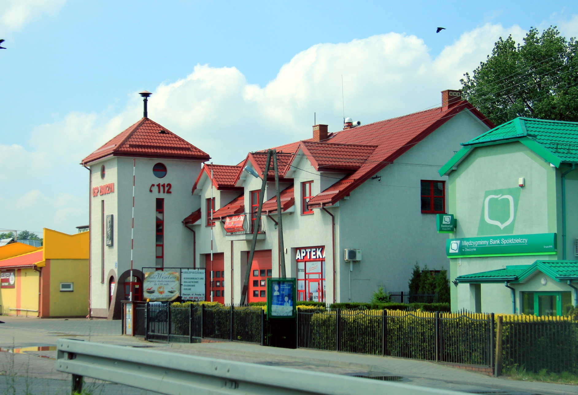 Zbuczyn - OSP, gmina Zbuczyn, woj. mazowieckie